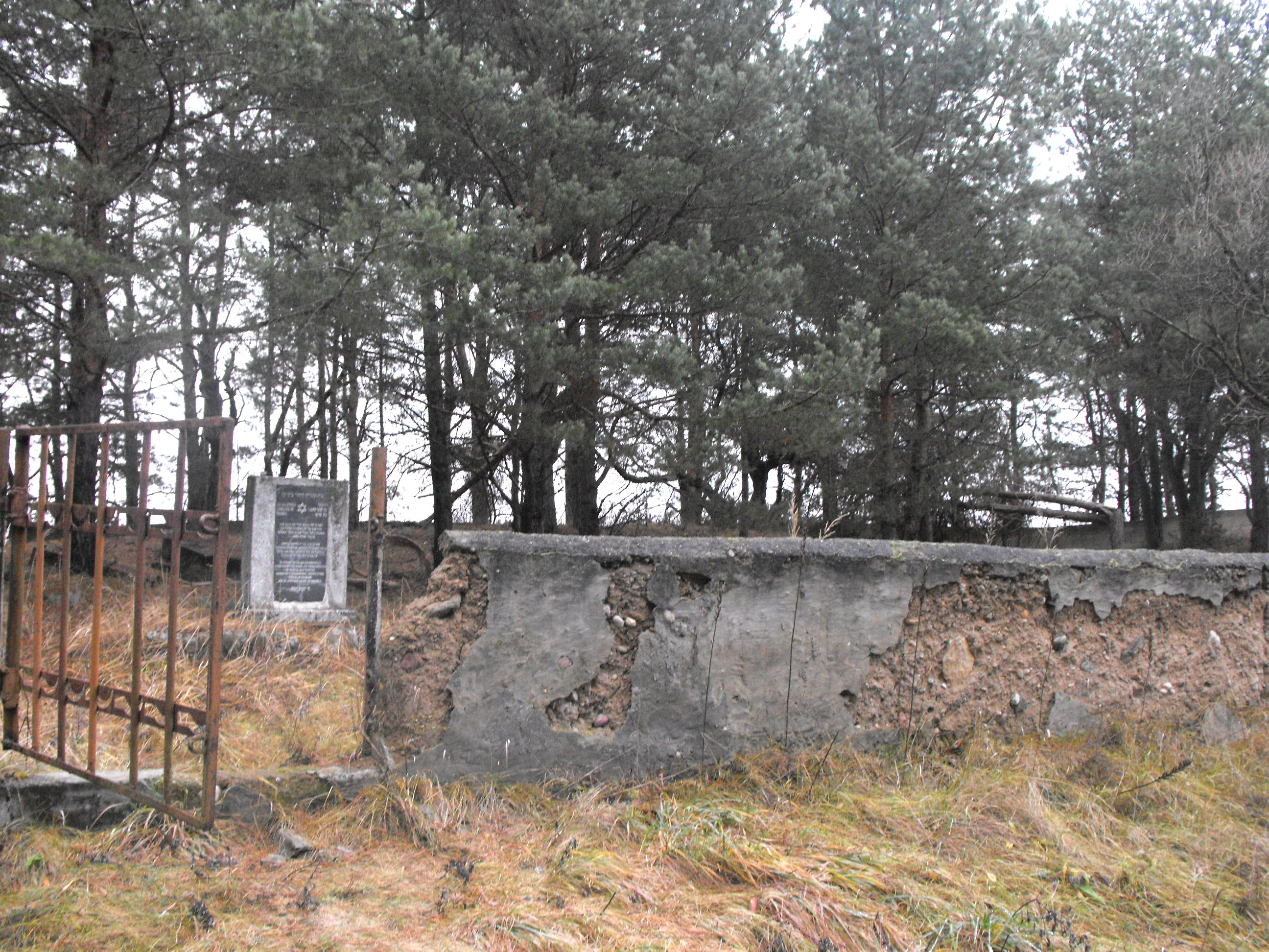 Обелиск на еврейском кладбище Вилейки в память об убитых нацистами евреях Вилейского гетто.